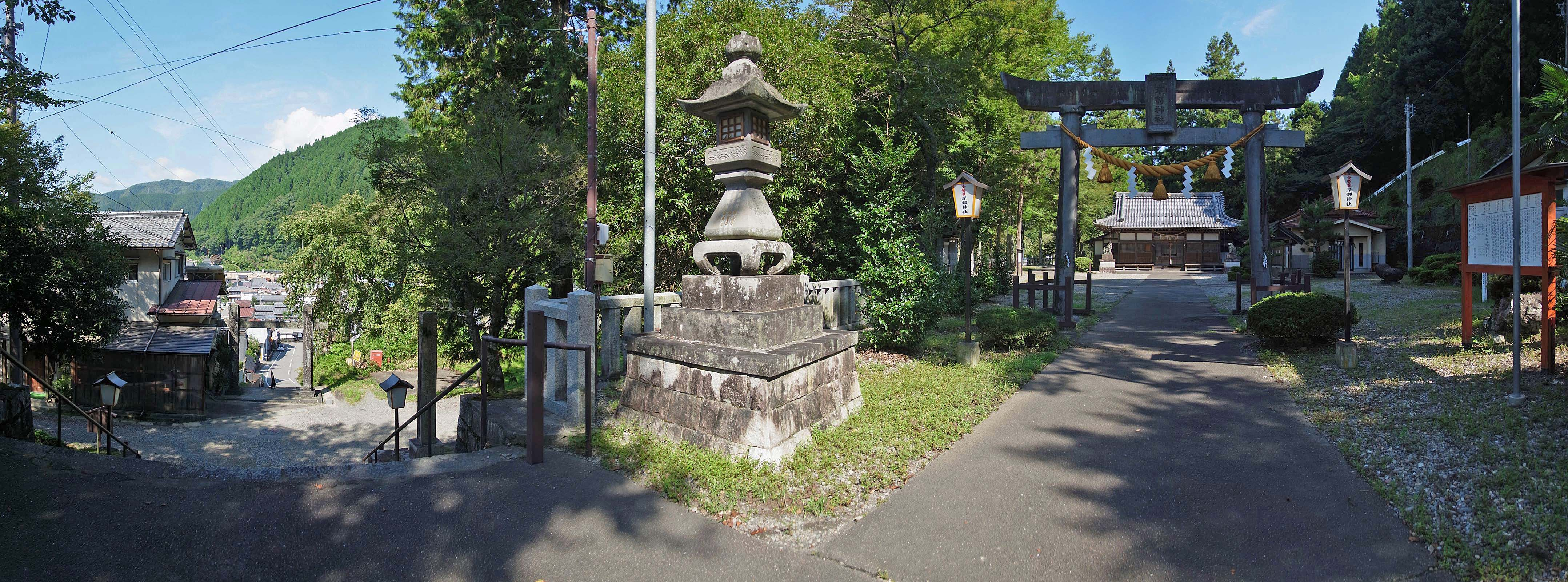 Kishi tsurugi shine , 岸剣神社